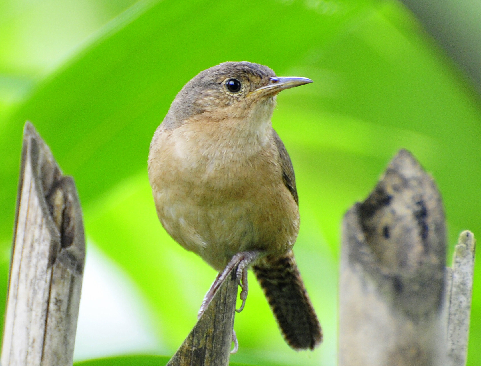 Lanchonete OASYS - Vale do Ribeira - Registro-SP - Brasil